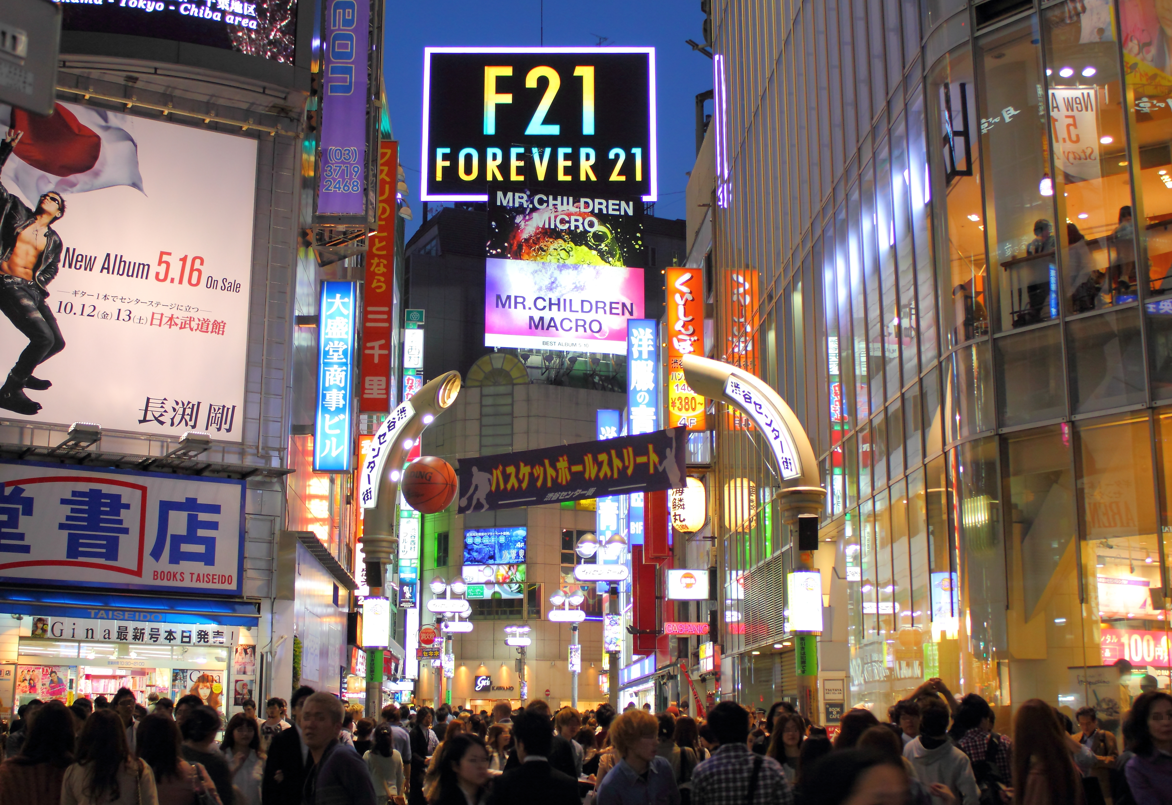 渋谷センター街（東京都渋谷区）